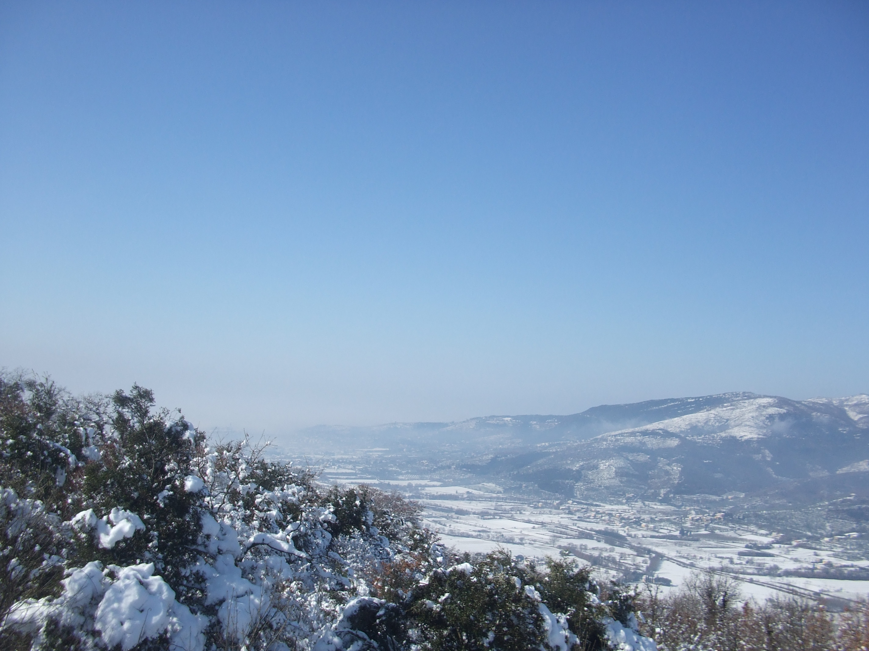 Val di Chio sotto la neve